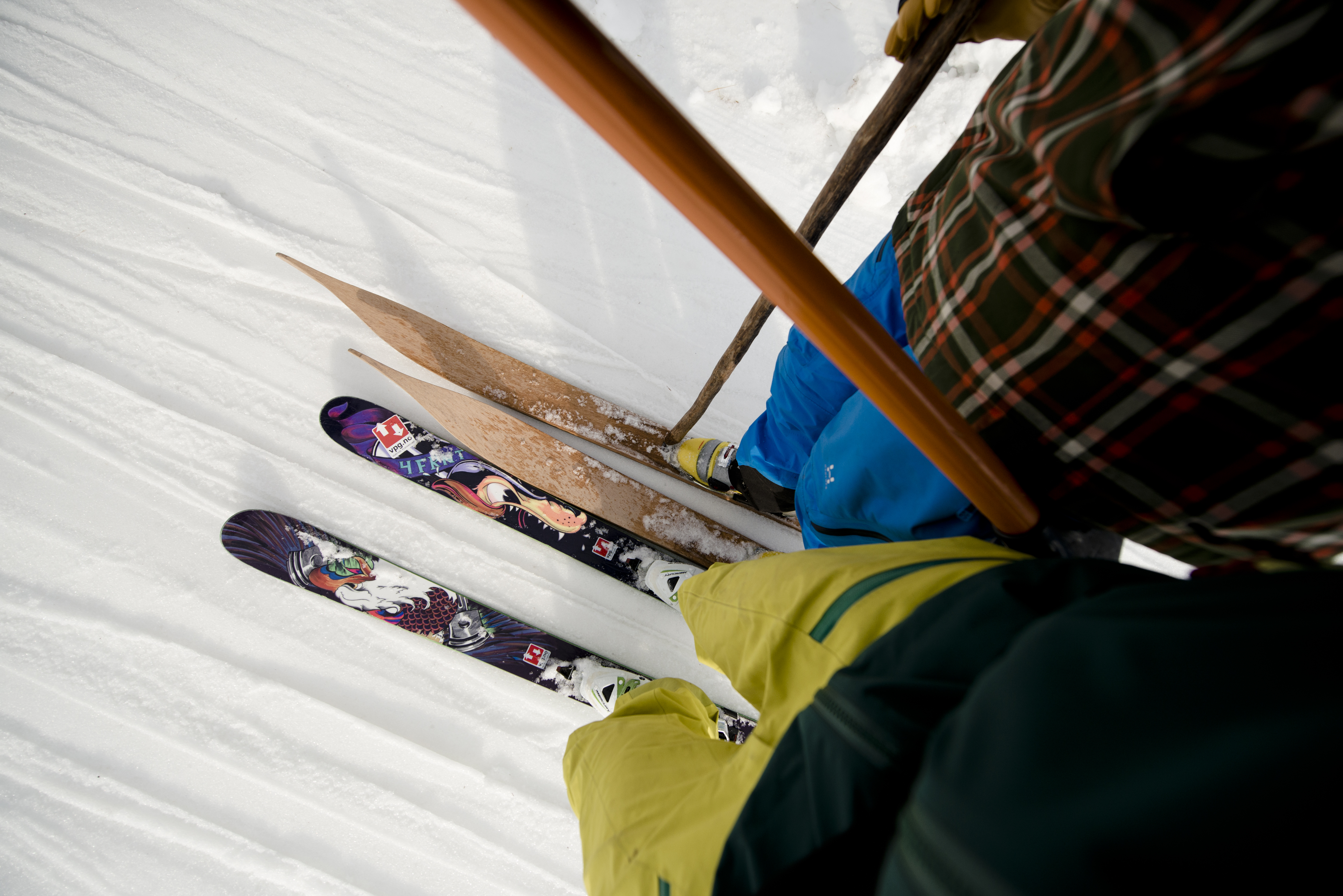 Moderne alpine komposittski og replika av gammel skitype